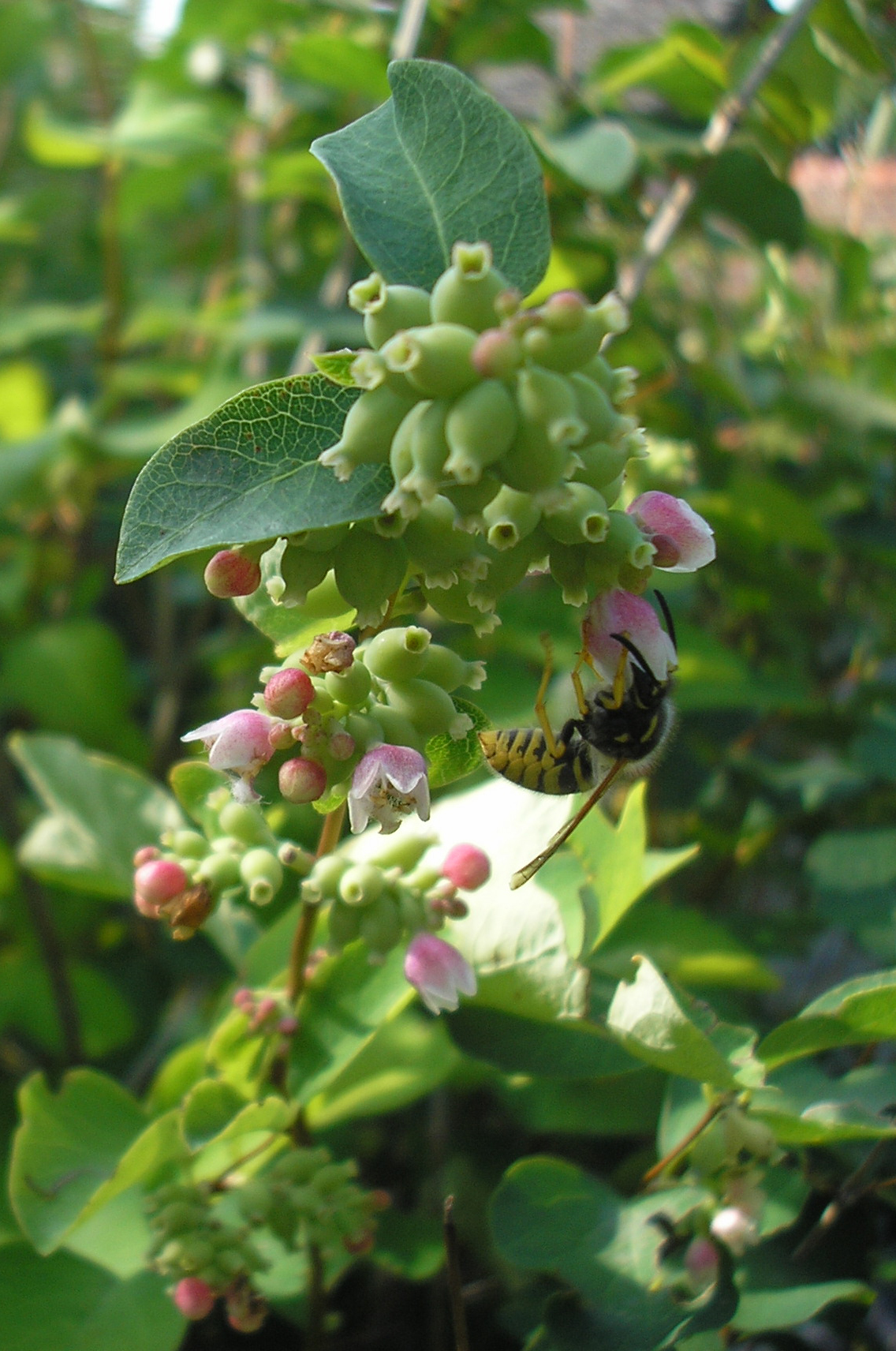 Vespa